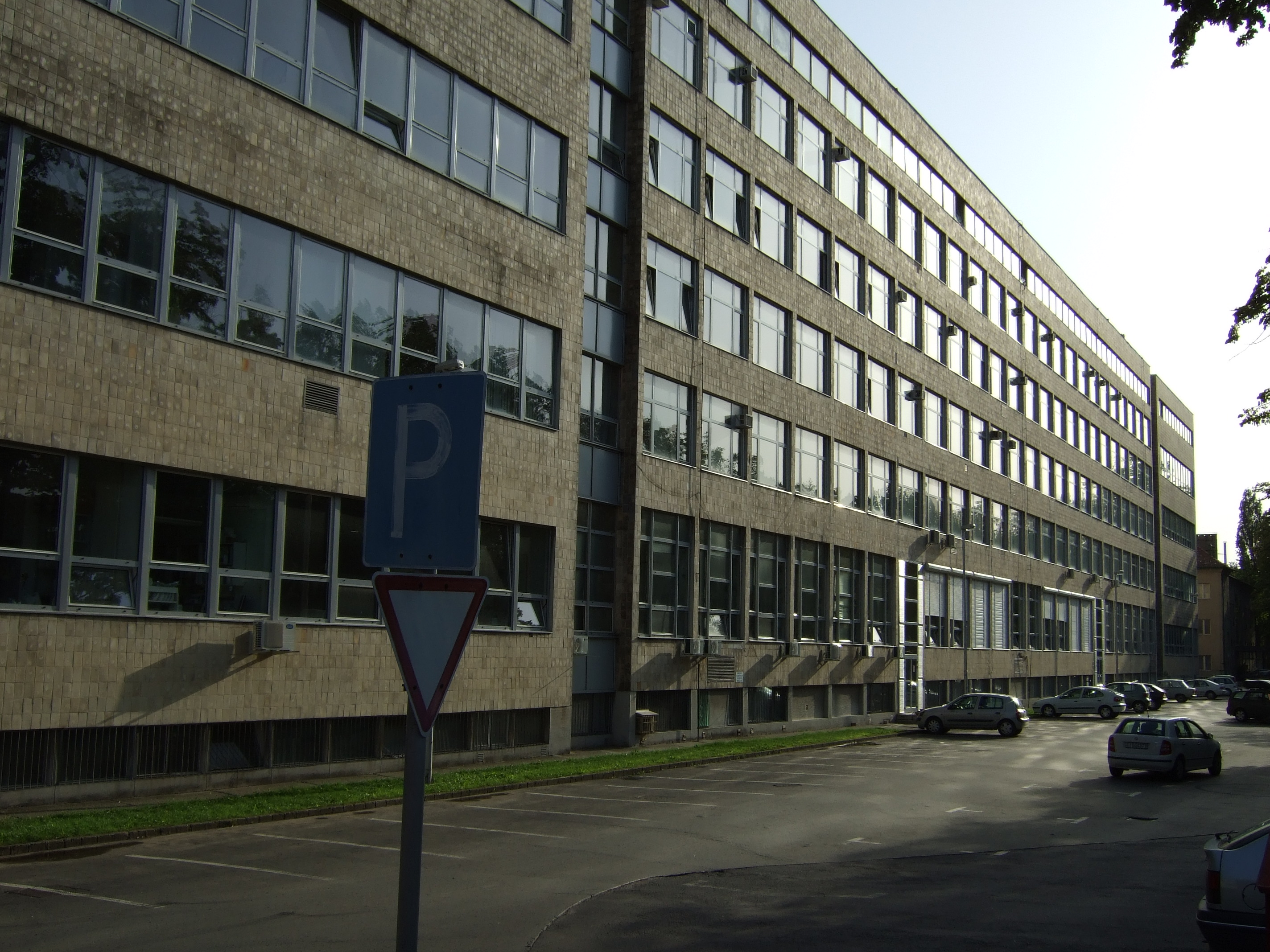 Medizinische Fakultät Pécs